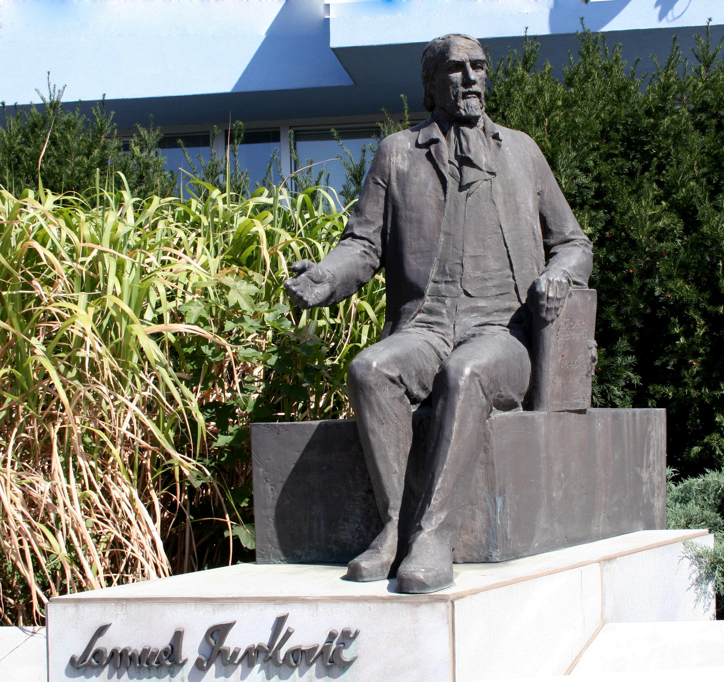 Bronzová plastika Samuela Jurkoviča v bratislavskom Ružinove